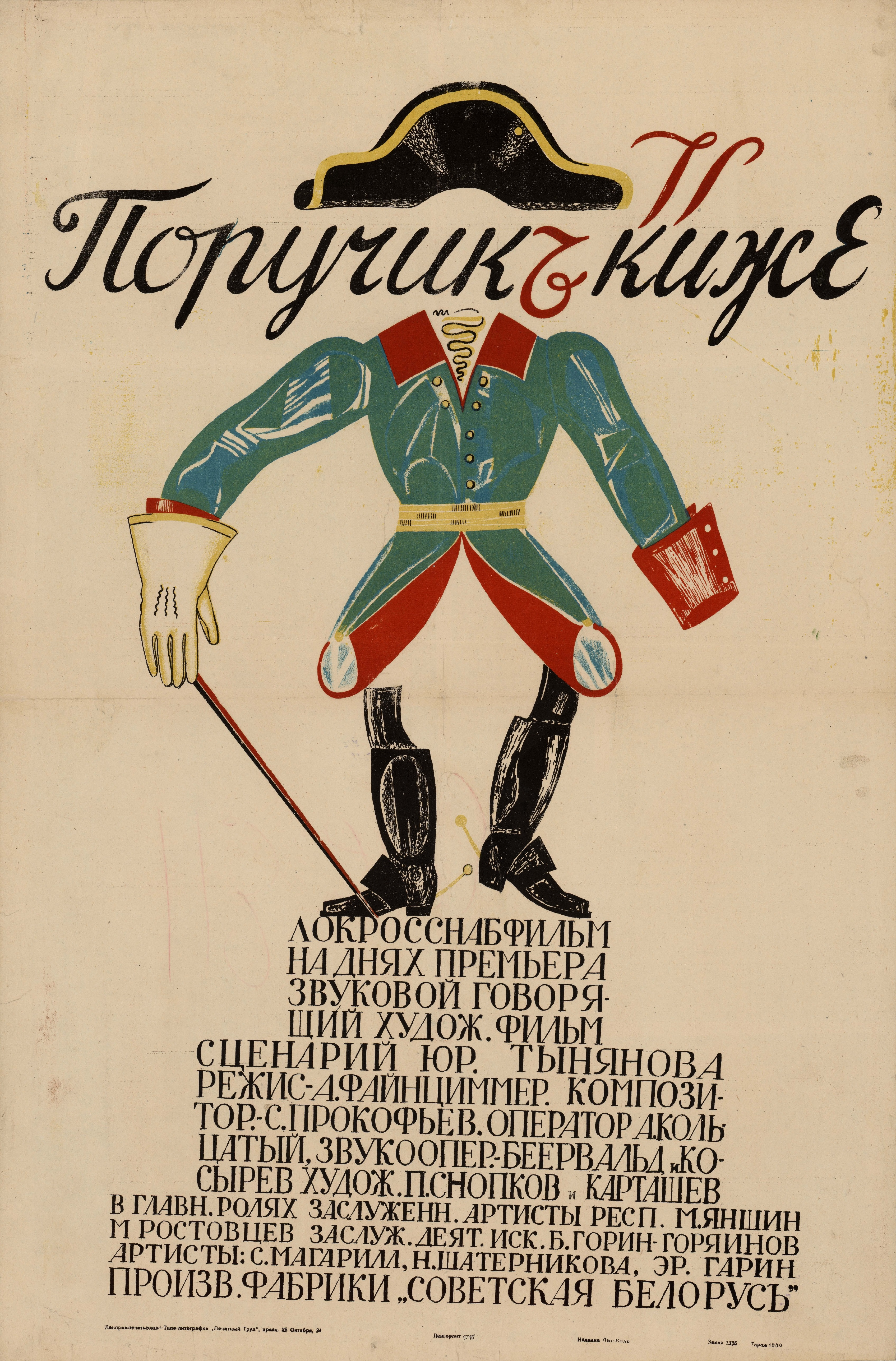 Плакат к советскому художественному фильму «Поручик Киже» (Производство Белгоскино, реж. Александр Файнциммер). Москва: Издание Ленкино, [1934]. Хромолитография, 91×61 см. Тираж 1000 экз.